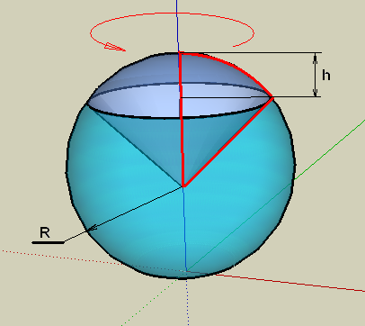 Kuglin isječak